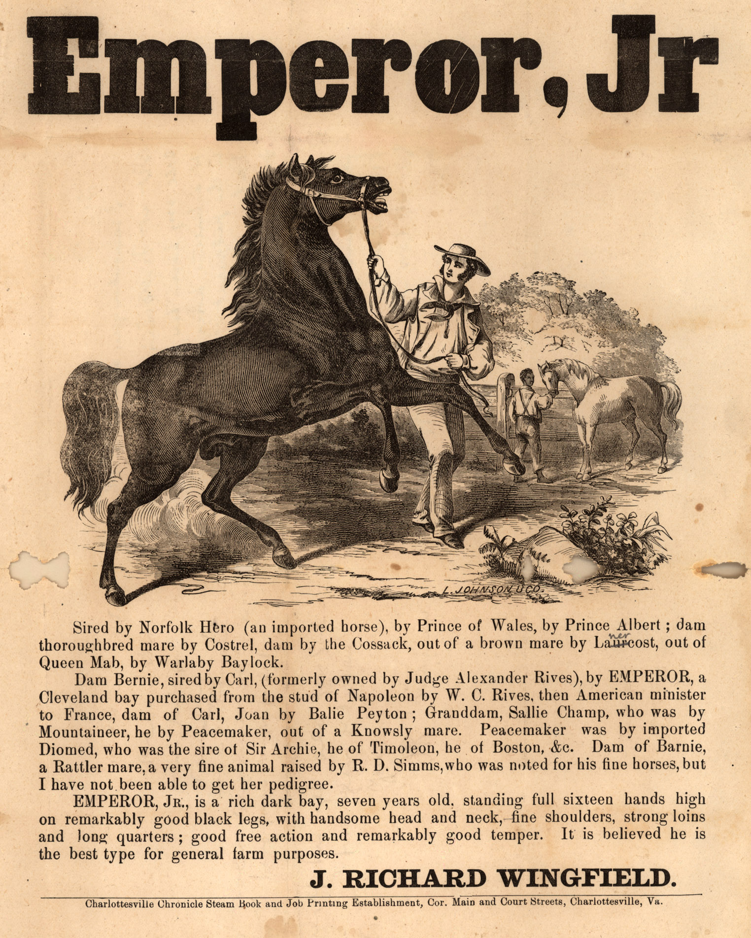 Stud advertisement from Charlottesville, Virginia.